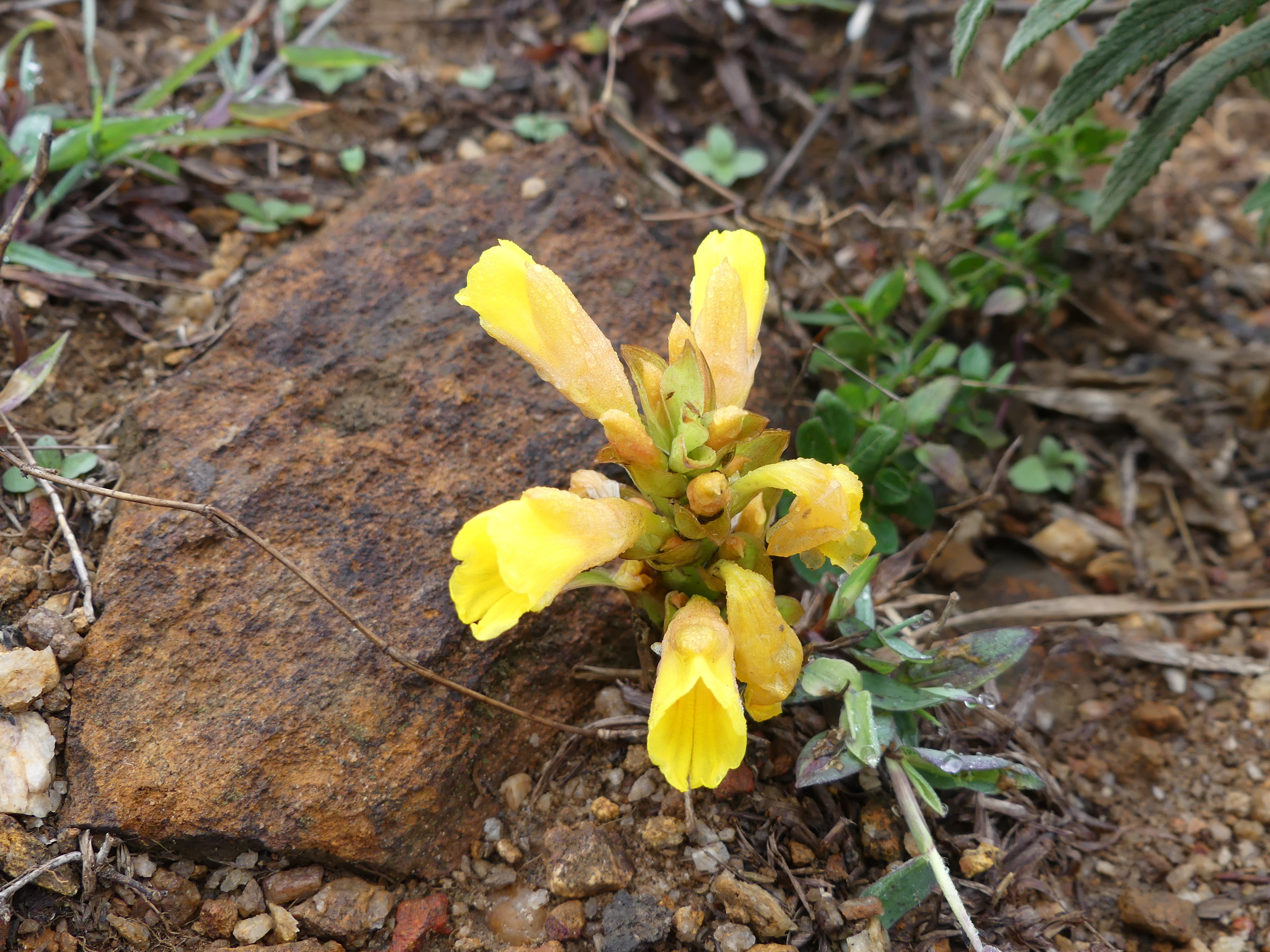 Curcuma karnatakensis in Pushpagiri Wildlife Sanctuary